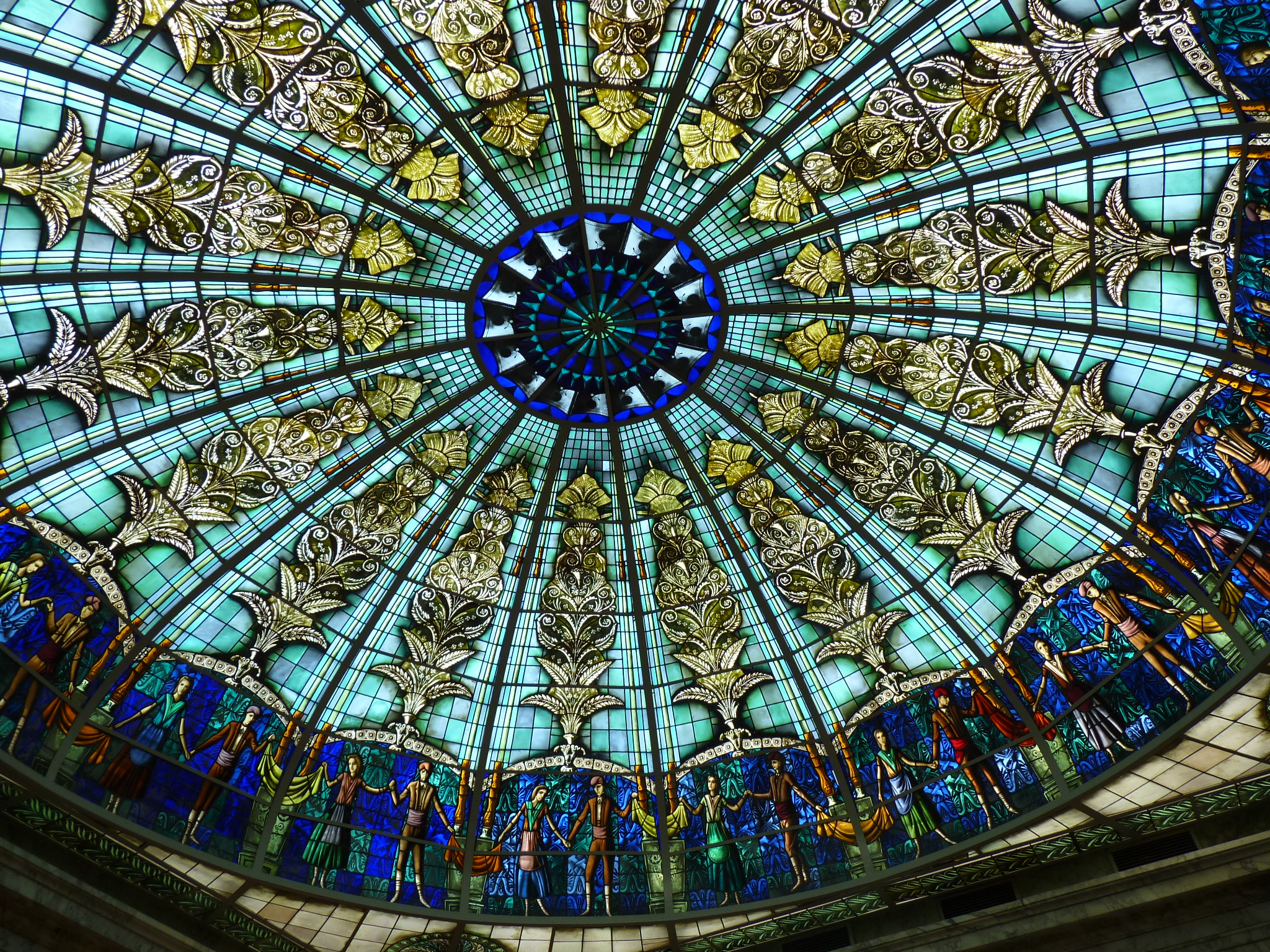 Cupula